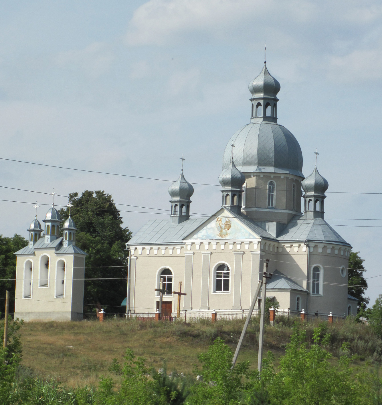 церква святого Вознесіння: Греко-католицька церква святого Вознесіння в селі Гаї Розтоцькі